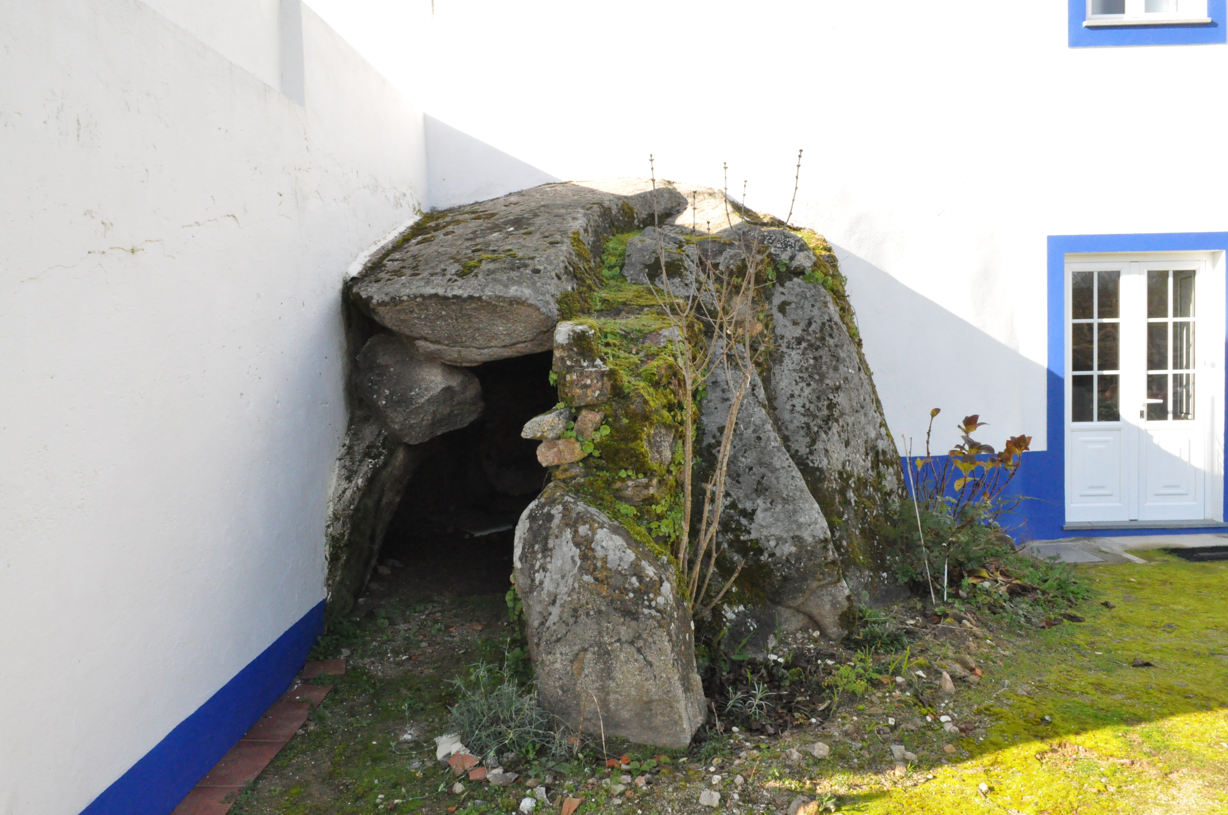 Anta dos meados entre o seculo IV e III,situada no fim da Rua Esquerda, onde foi feita posteriormente uma casa onde a parede ficou encostada à anta